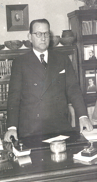 Fotografía del Rector de la Universidad Nacional de Tucumán, Adolfo Piossek.